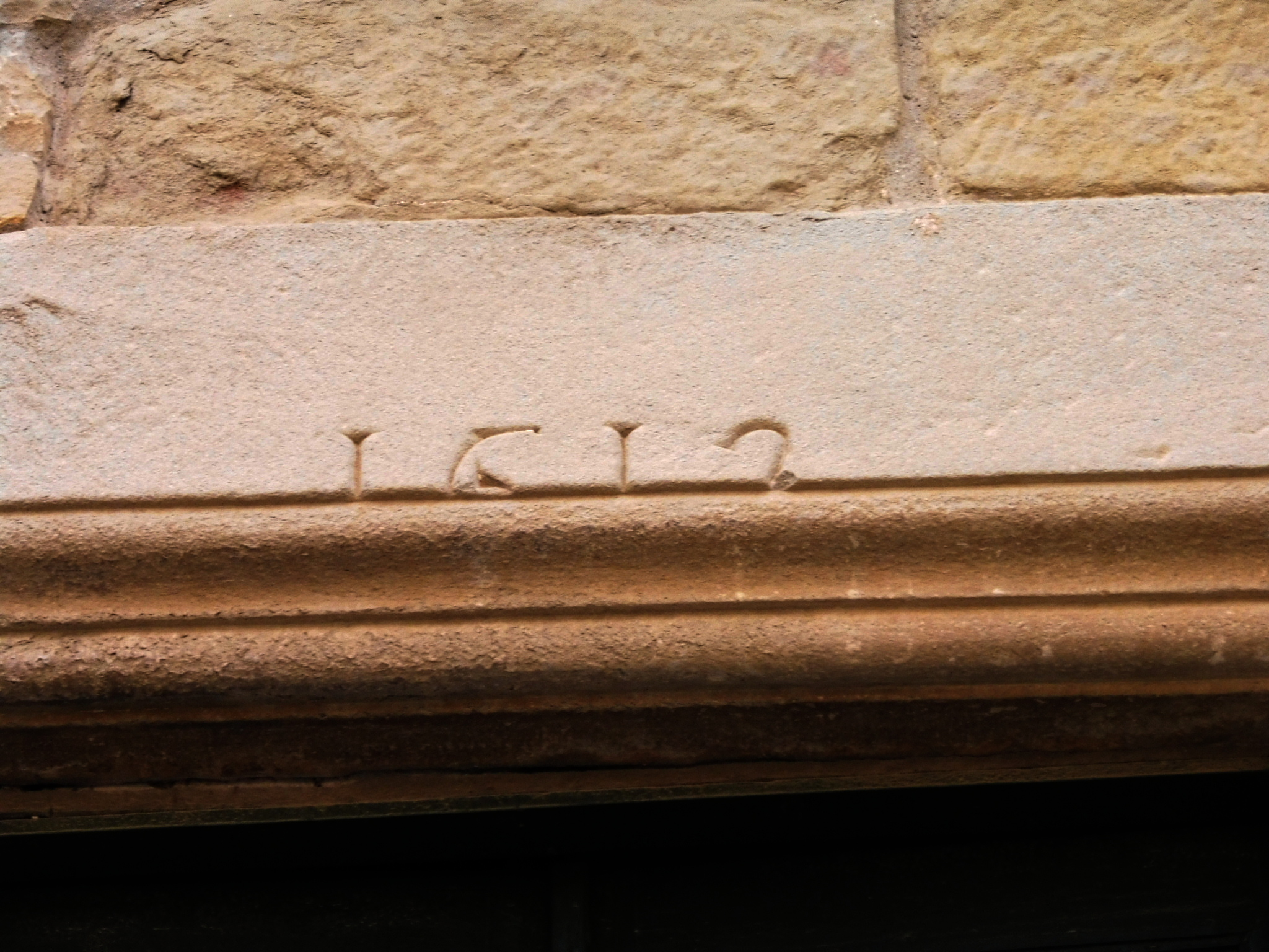 Cal Tarragona (Castellserà): llinda d'una finestra